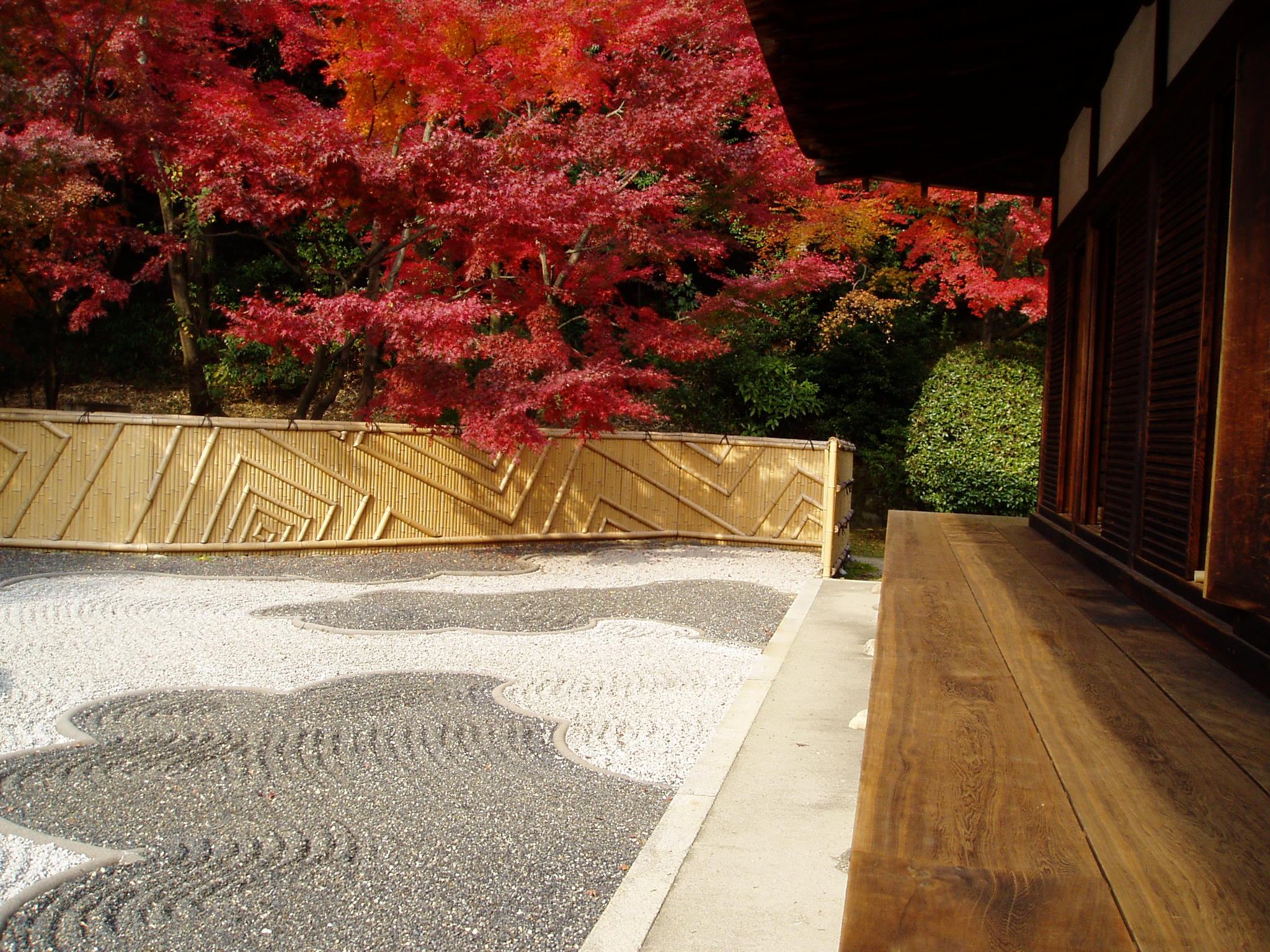 龍吟庵(京都府京都市) 2005年11月28日撮影 撮影機材:OLYMPUS μ10 撮影者:Maechan0360 Category:京都府の画像 Category:京都市の画像 Category:都市公園・庭園の画像 Category:日本の寺の画像